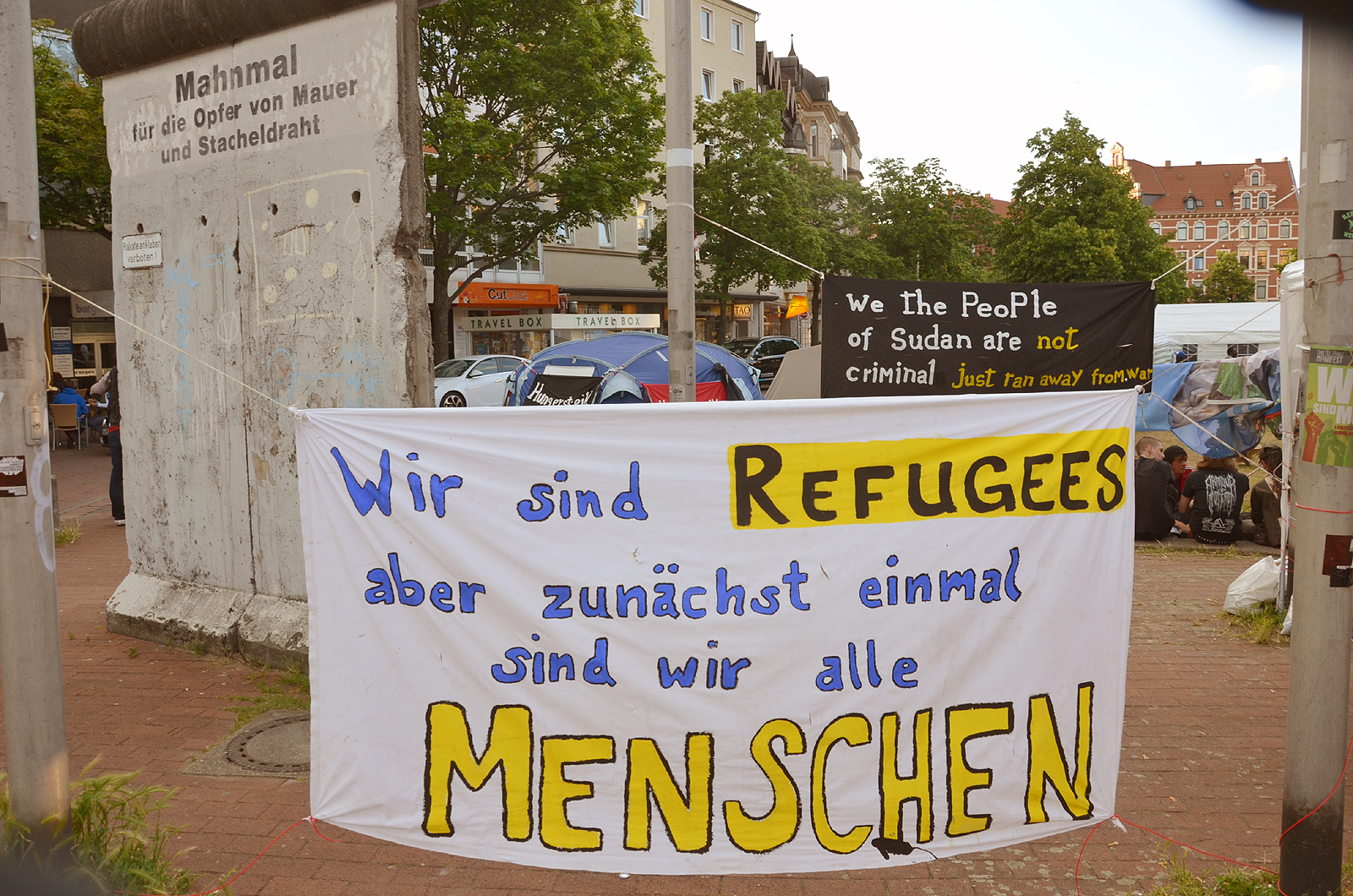 Am 24. Mai 2014 schlugen Flüchtlinge aus dem Sudan ihre Zelte auf dem Weißekreuzplatz in Hannover auf, um öffentlich sichtbar friedlich gegen ihre Abschiebung zu protestieren ...